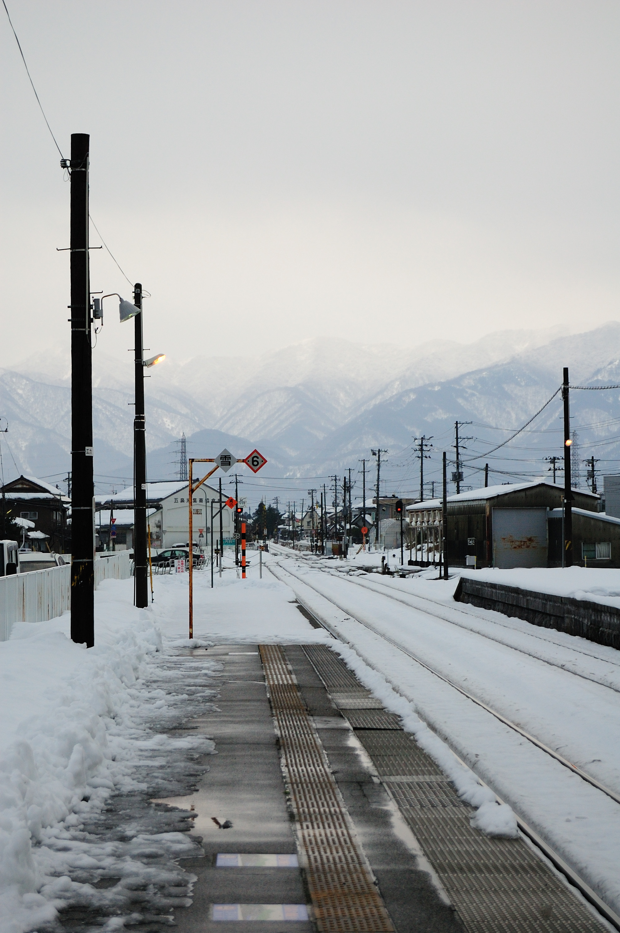 磐越西線・五泉駅。飯豊連峰を望む。Nikon D40